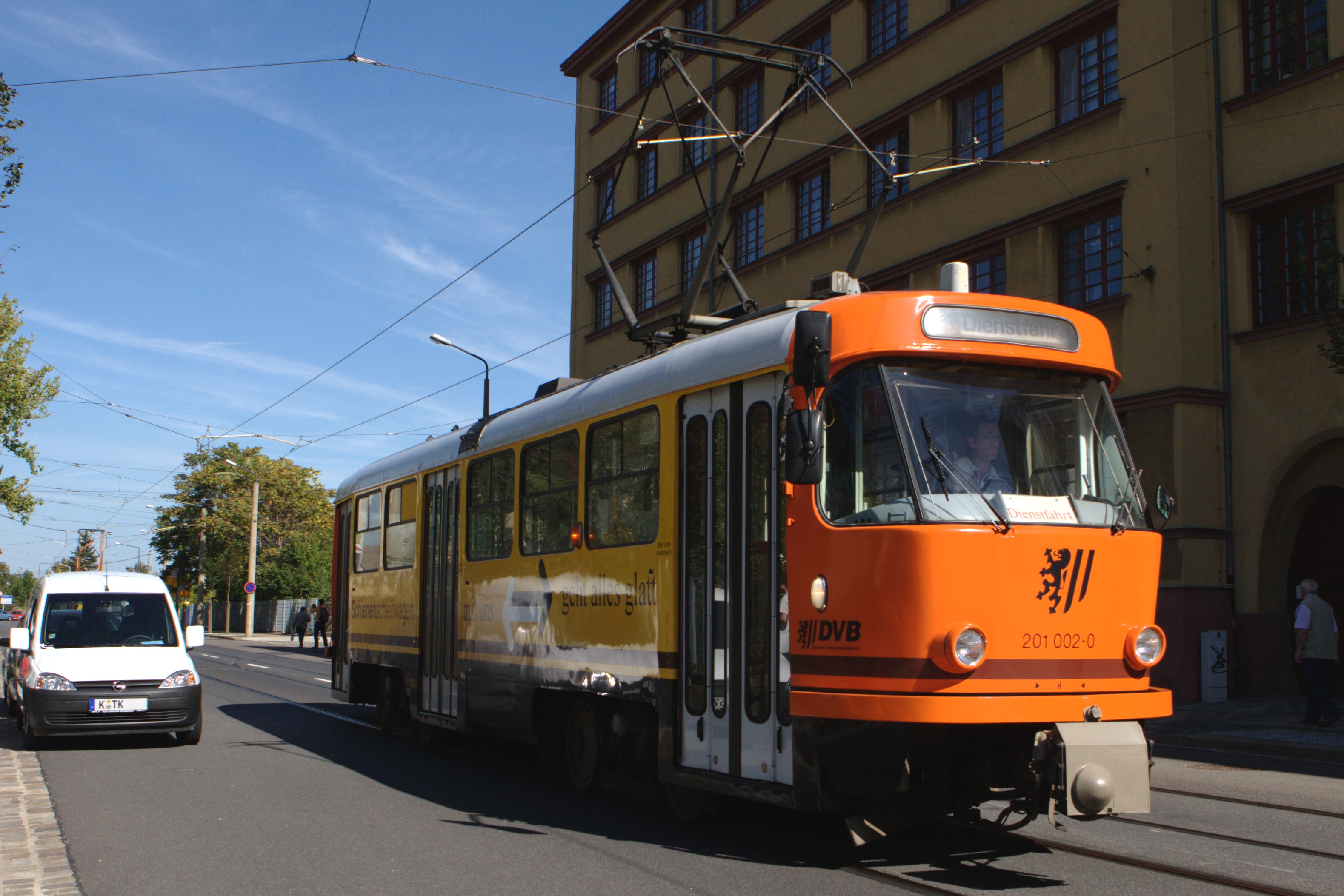 Tatra T4 Schienenschleifwagen DVB Dresden